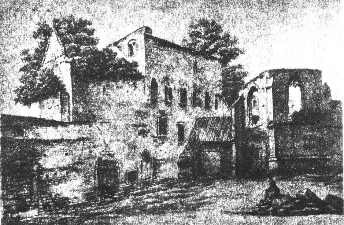 Speyer, Retscherruine und Margaretenkapelle